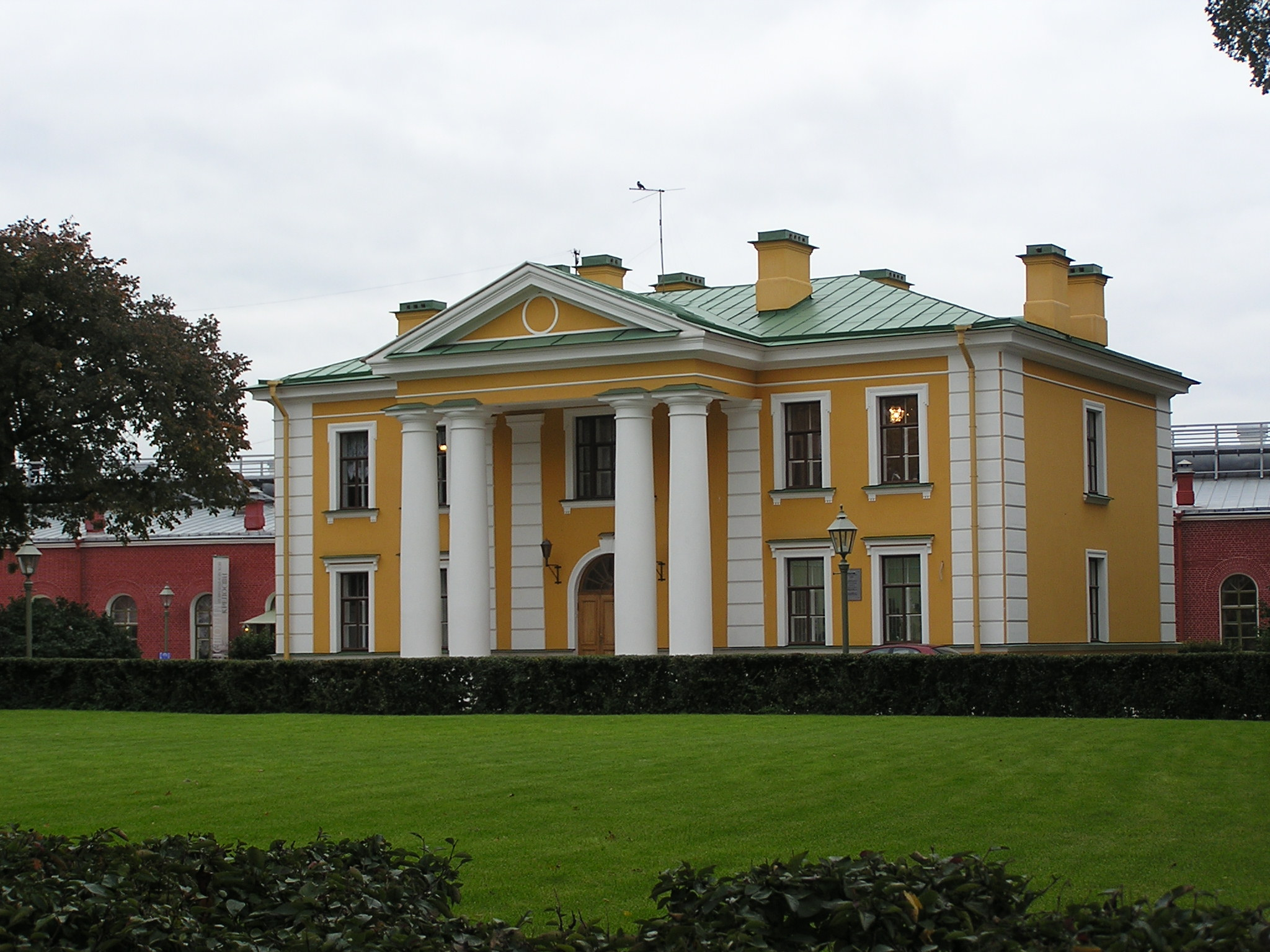 Санкт-Петербург. Петропавловская крепость. Главная гауптвахта